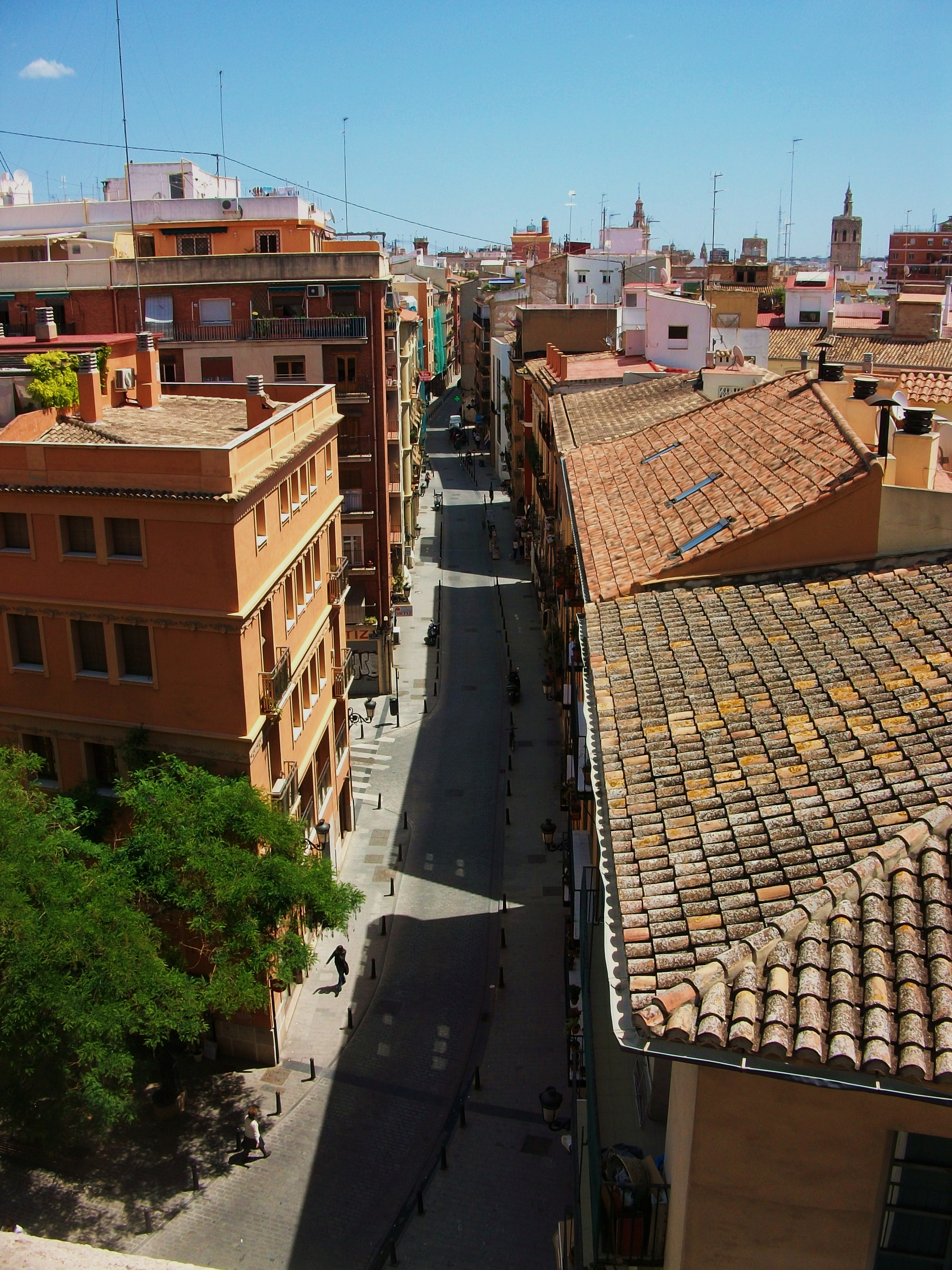 Carrer de Quart des de les Torres de Quart, València.